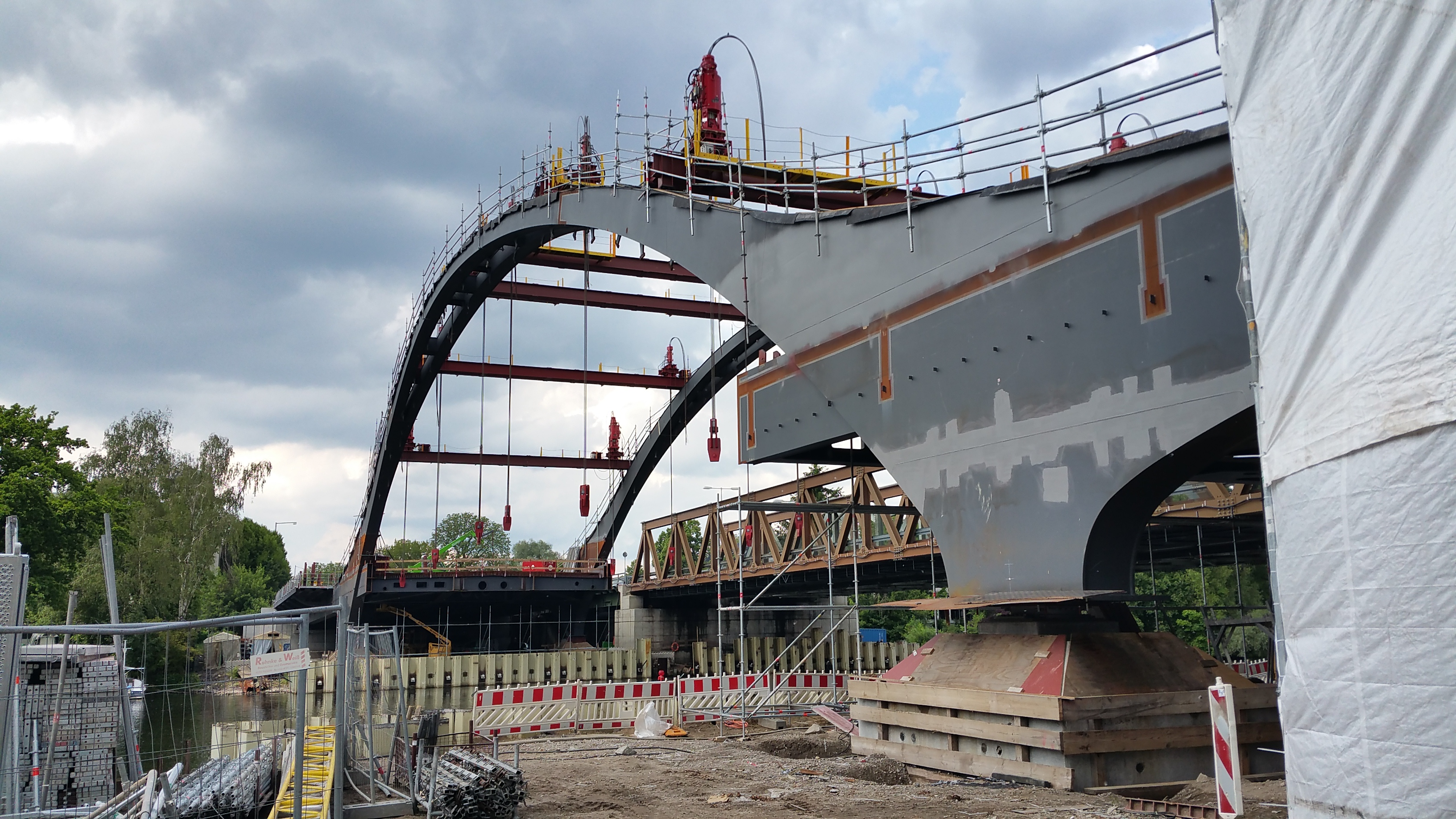 Freybrücke am 2. Juni 2016. Fahrbahn fehlt noch. Litzenheber zur Stromfeldhebung sichtbar.